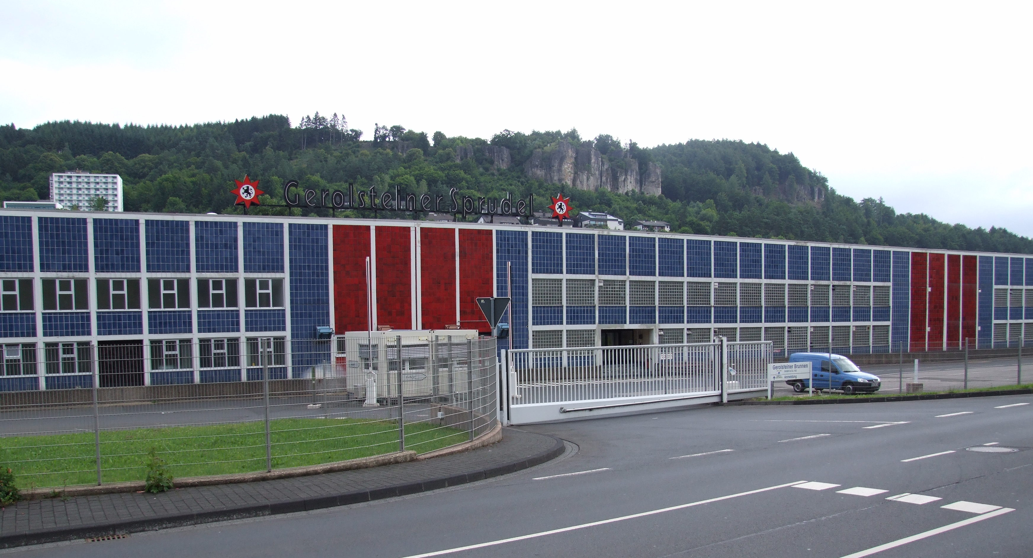 Werk Gerolsteiner Sprudel, Gerolstein